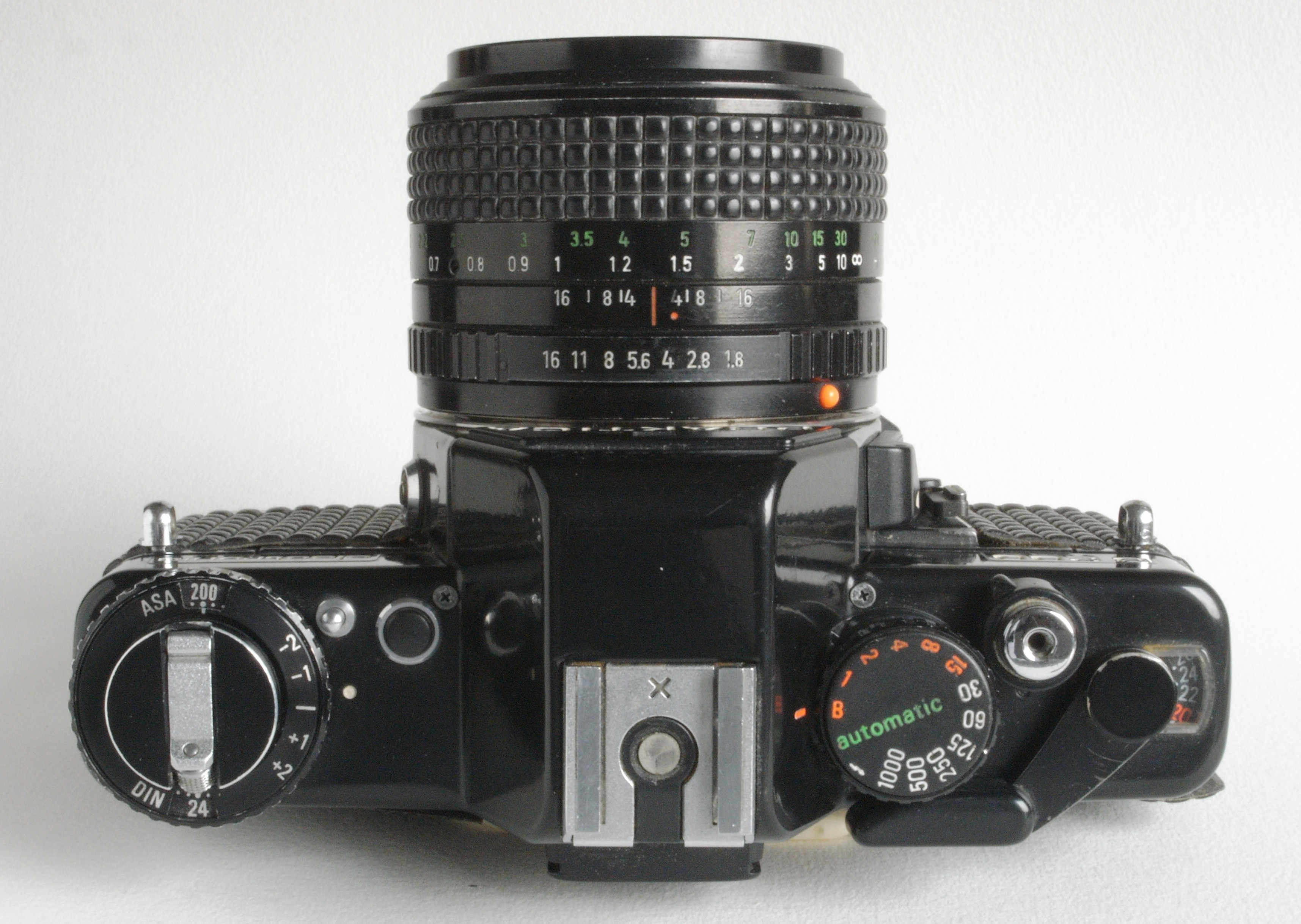 Praktica B 200 electronic, Kopfansicht